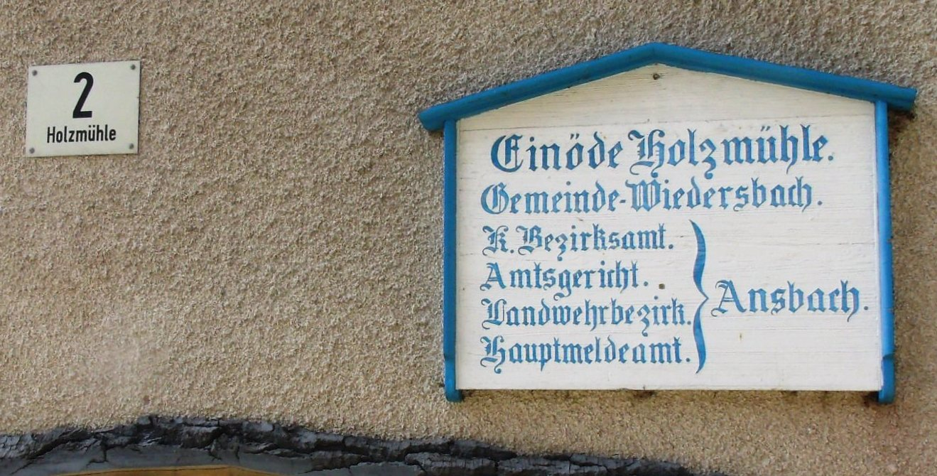 Holzmühle, Ortsteil von Leutershausen im mittelfränkischen Landkreis Ansbach, historisches Ortsschild